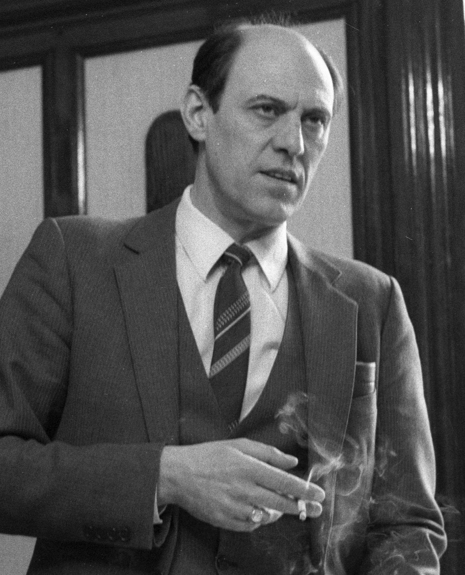 Kupa Mihály Location: Hungary Title: Kupa Mihály